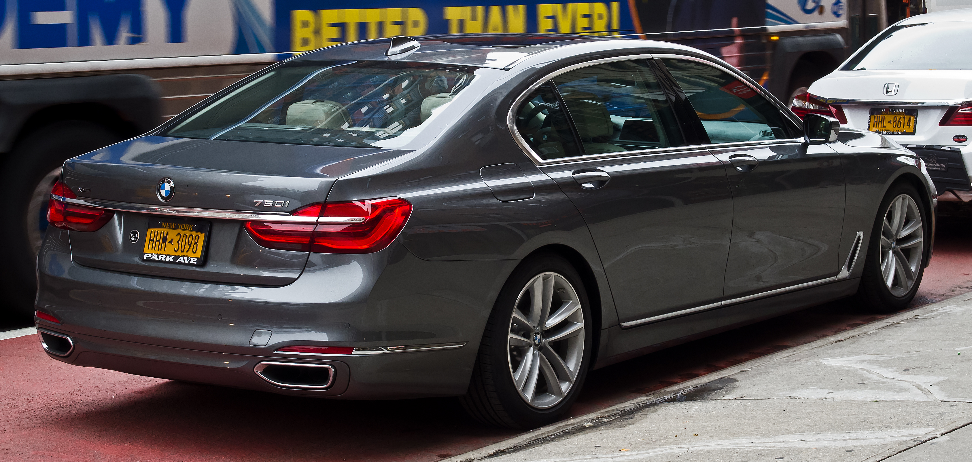 BMW 750i (G12)